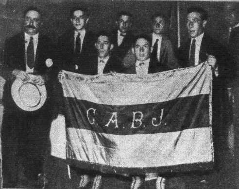 Foto del plantel de Boca Juniors autor de la exitosa gira por Europa en 1925